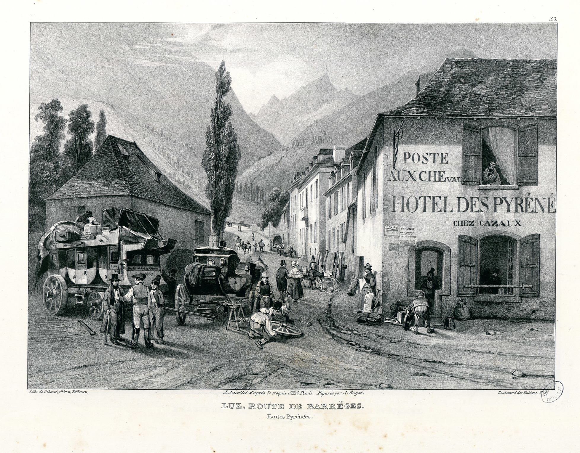 Fait partie de la première partie d'un recueil de planches lithographiées. Titre lithographié et 50 lithographies numérotées de 1 à 50, plus 4 lithographies supplémentaires numérotées de 1 à 3 (ici pl. 53, 54, 55) et une sans numéro (ici pl. 52). Deux planches sont numérotées 10, ce qui fait en tout un album de 55 pl. L'ouvrage de Jacottet est très rare quand il est complet des deux parties. Vignette lithographiée au titre : "Visite aux ruines de Beaucens, Vallée d'Argelez (Hautes Pyrénées)" Ancely, René (1876 - 1966). Possesseur